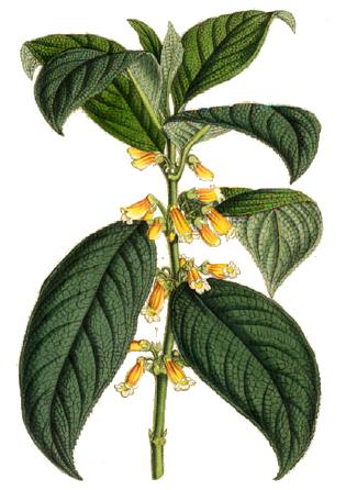 Hypocyrta leucostoma (=Besleria leucostoma)